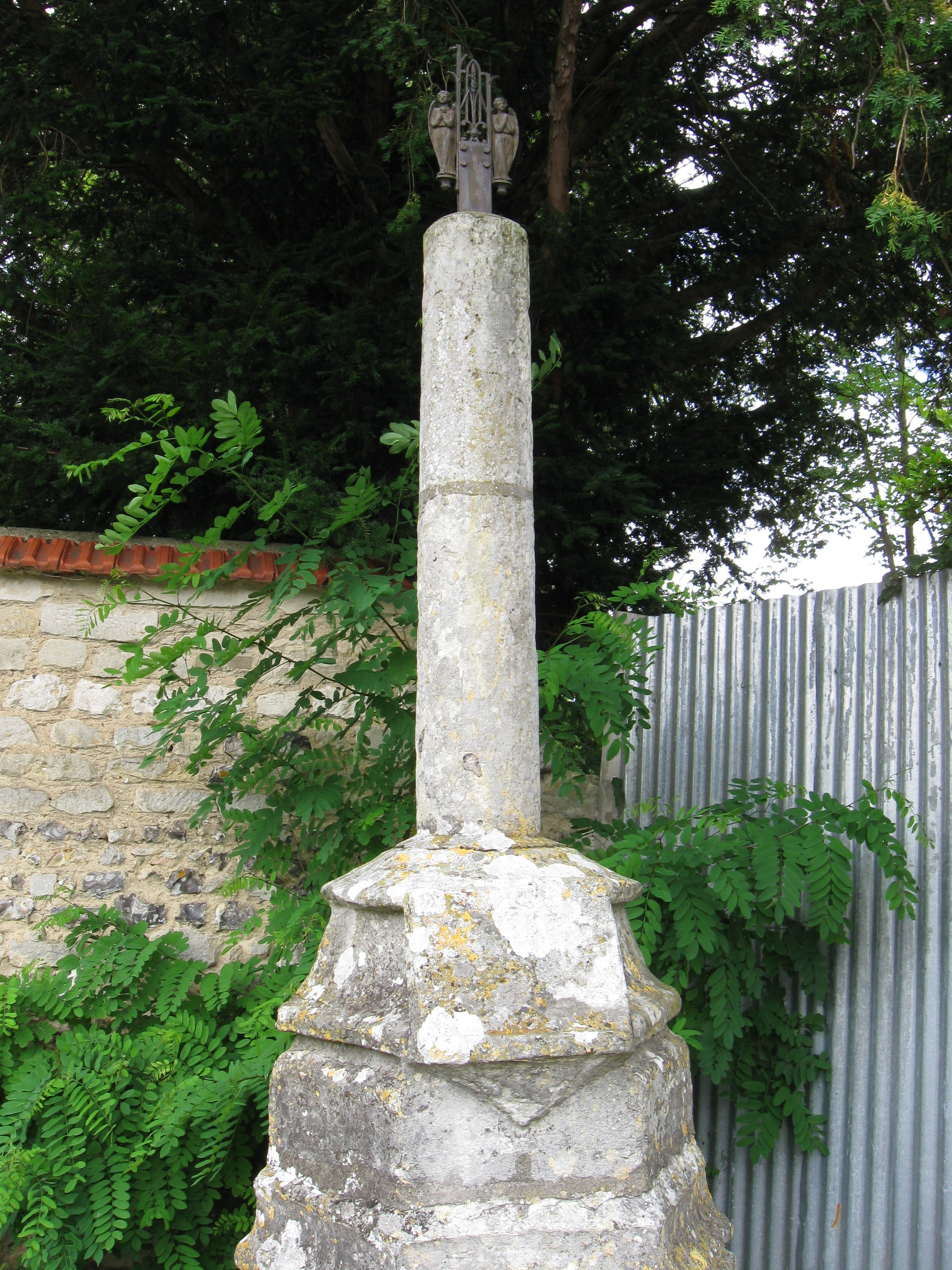 Croix monumentale à Sainte-Geneviève-lès-Gasny. (Eure, région Normandie).